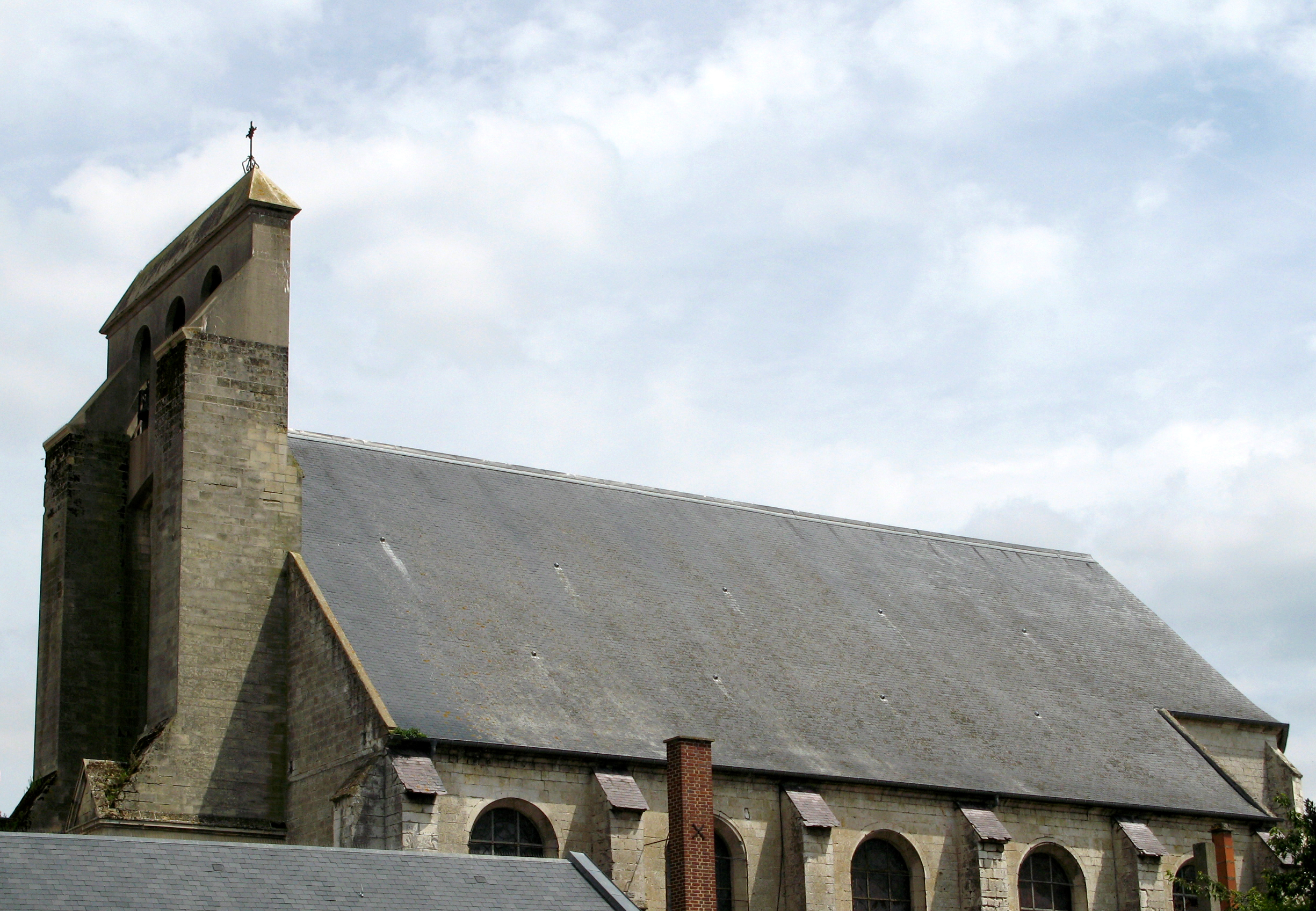 Flixecourt (Somme, France) - L'église. .